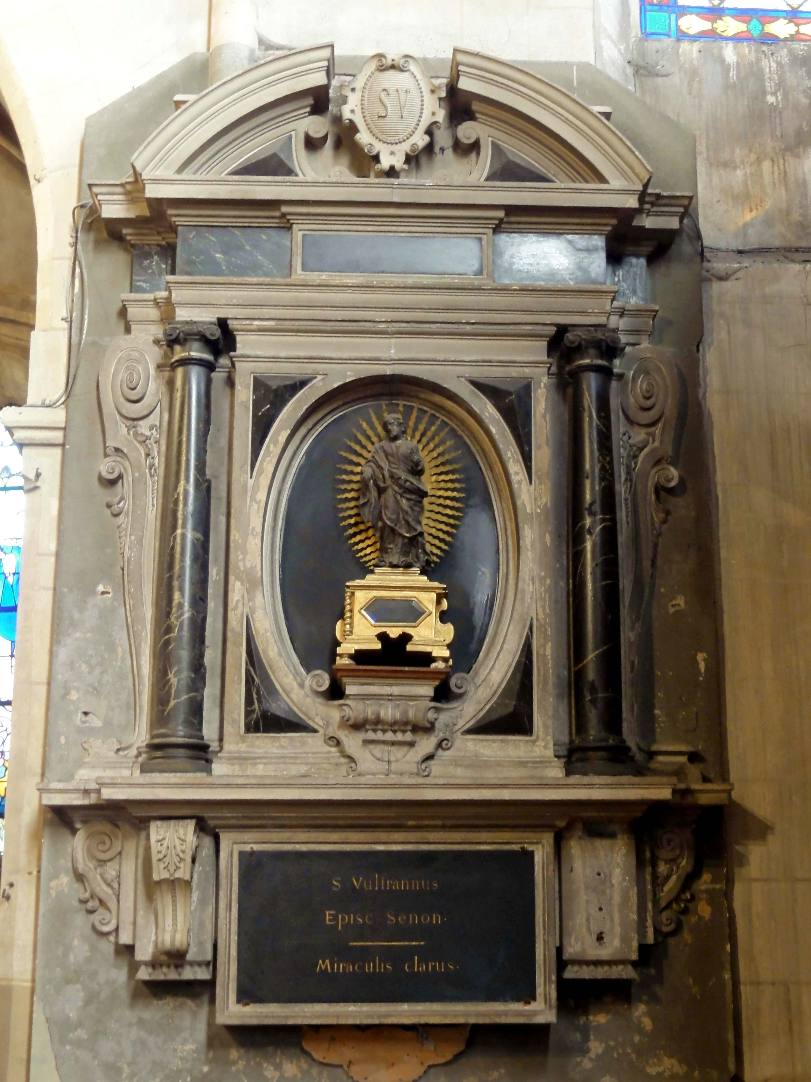 Voir titre.